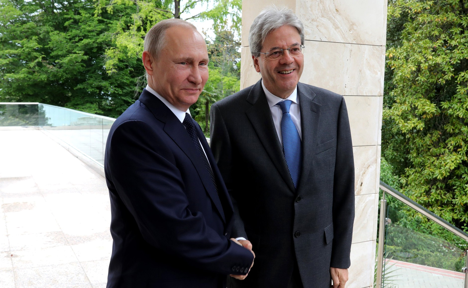 Встреча Президента России Владимира Путина с Председателем Совета министров Италии Паоло Джентилони